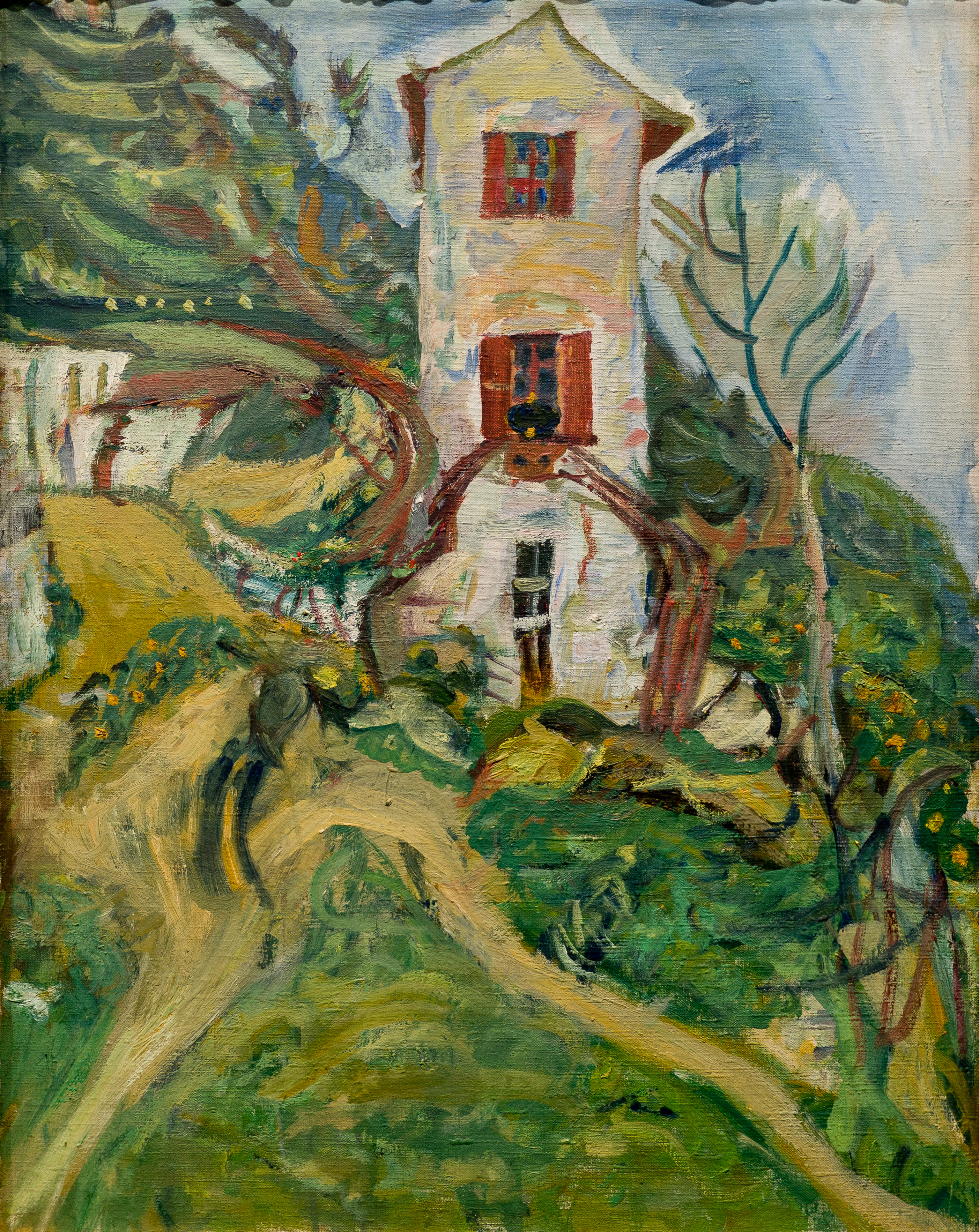 Chaïm Soutine (1893 - 1943) Coll. Jean Walter et Paul Guillaume, Musée de l'Orangerie, Paris